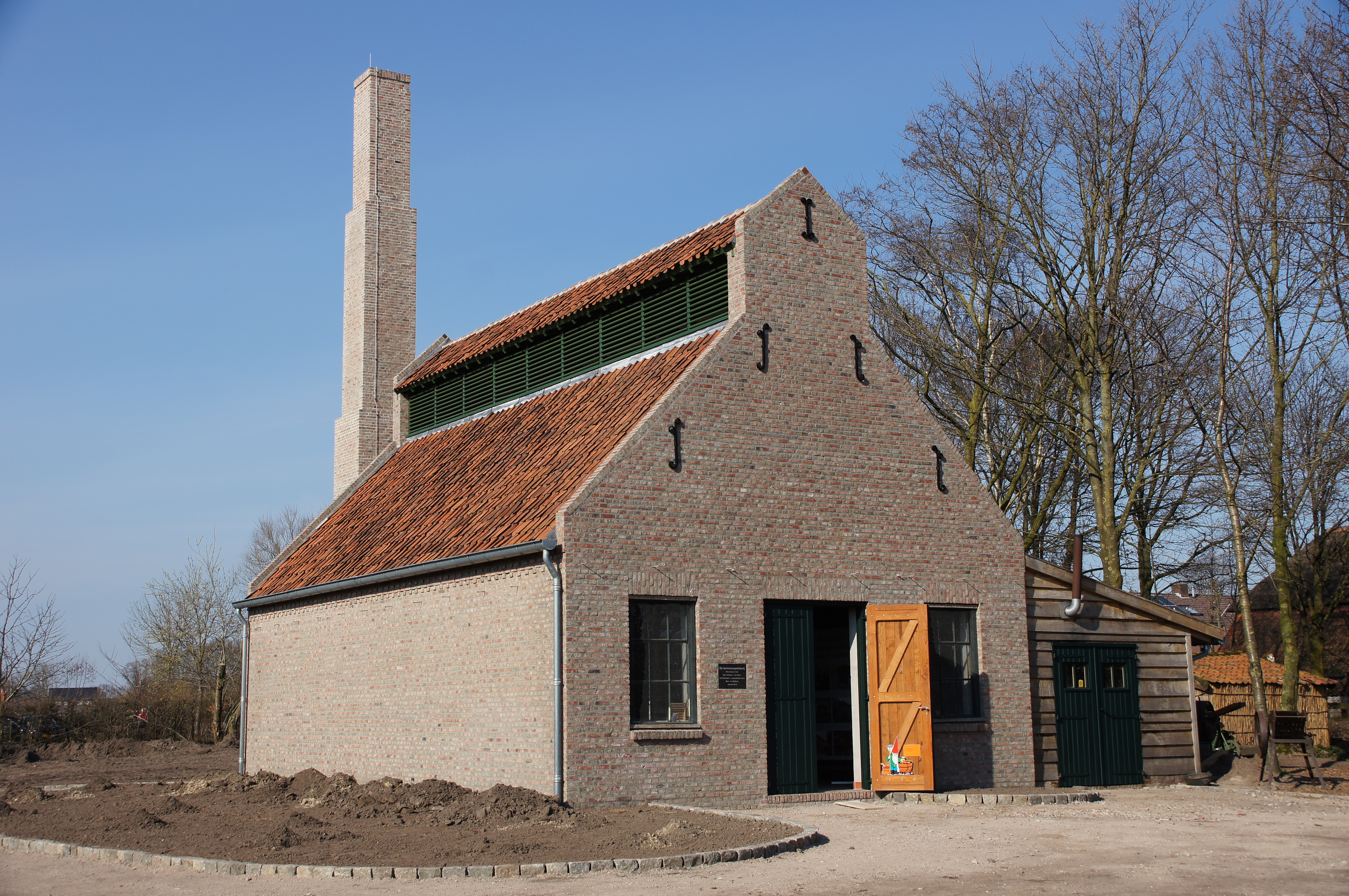 Limburgs Openluchtmuseum Eynderhoof, de Stroopstokerij is vooralsnog het laatste gebouw dat werd gebouwd. In het gebouw vinden demonstraties plaats van het stroopmaken. Maar op diverse themazondagen ook bierbrouwen, conserveren, wijn- en kaas maken